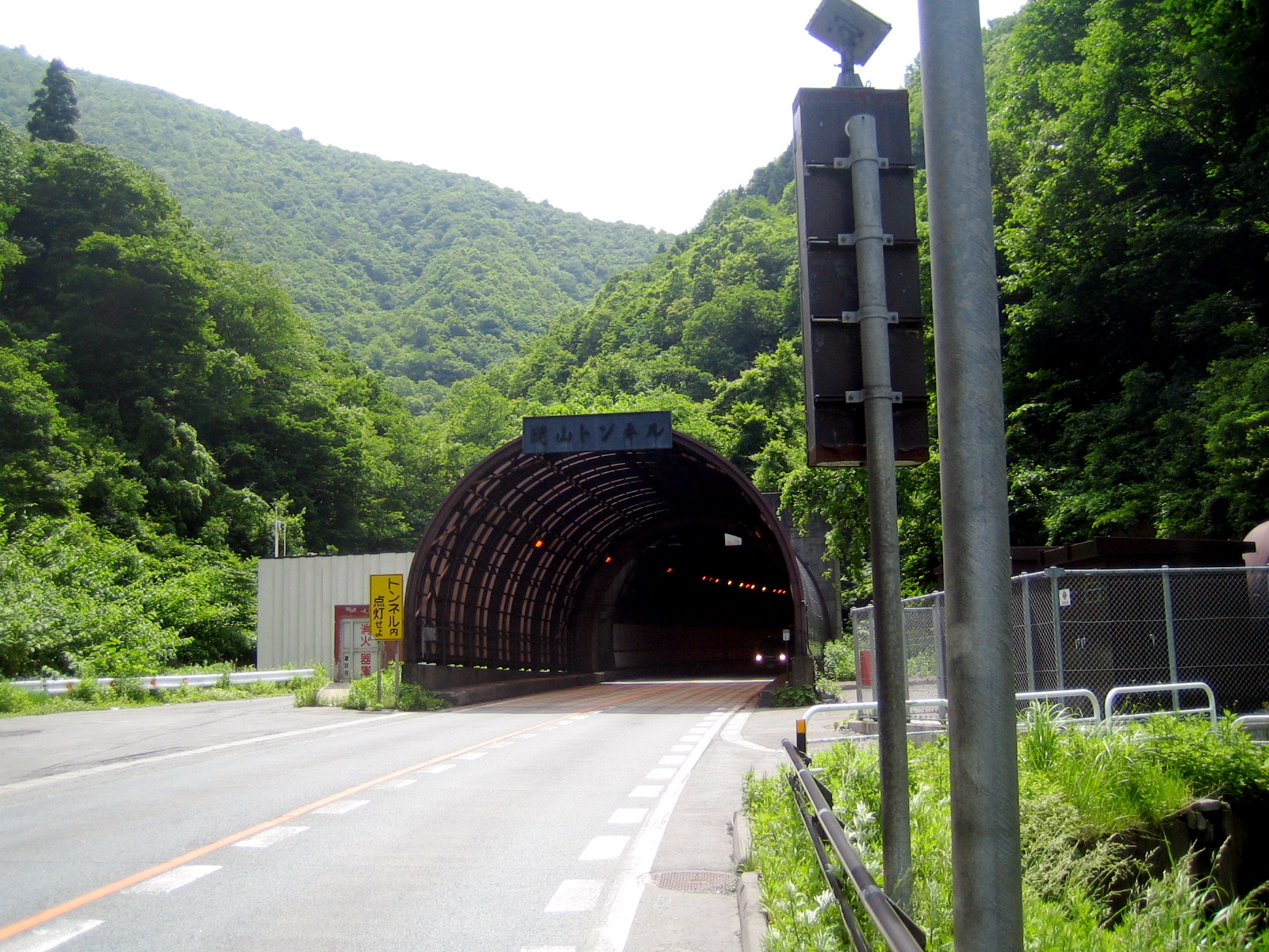 Sekiyama tunnel, a tunnel of route 48.